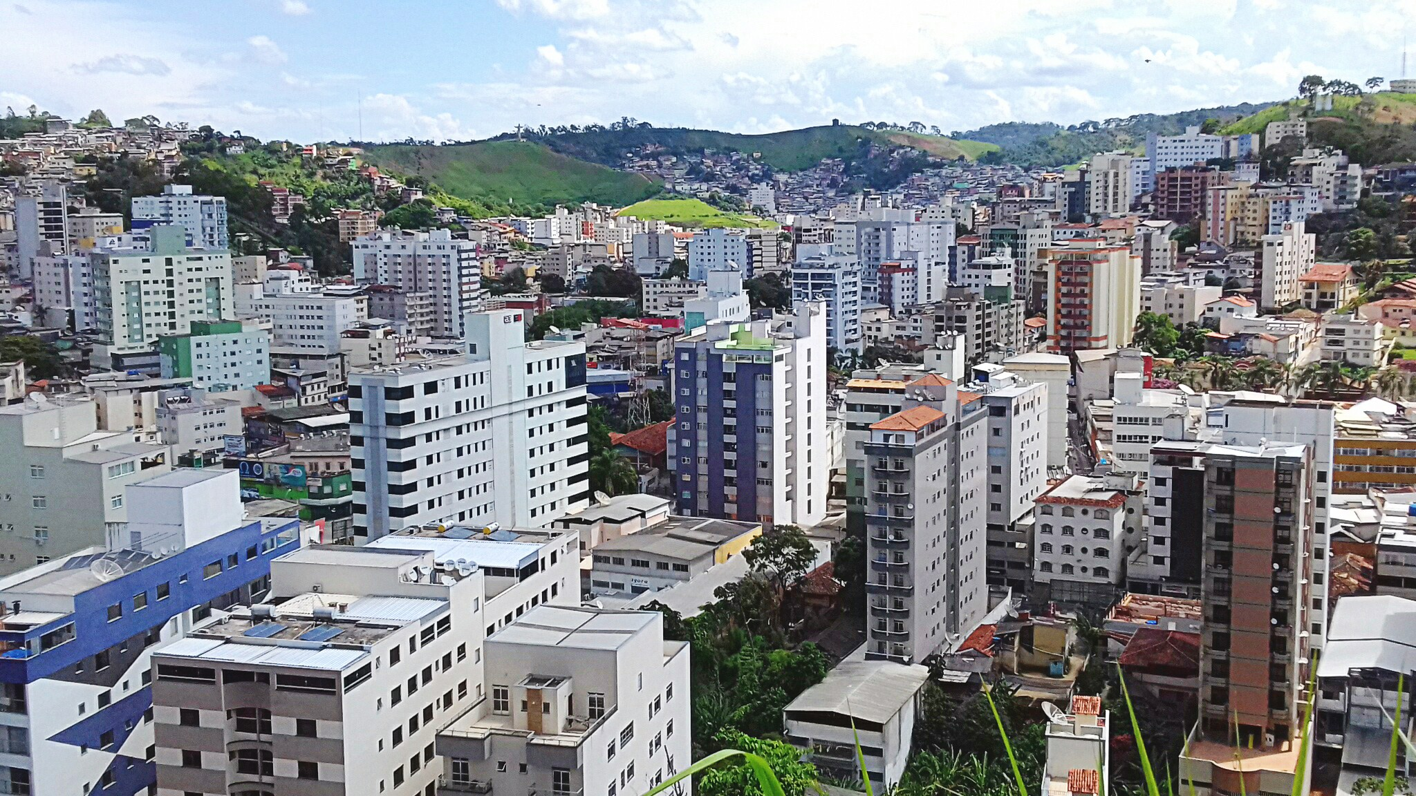 Vista Parcial de Viçosa - área central